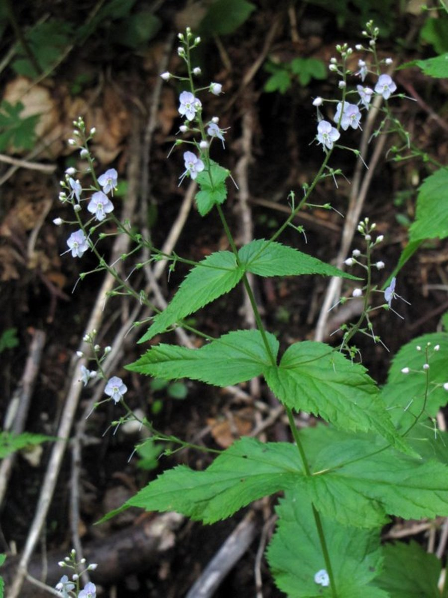 Koprivovolistni jetičnik na Komni.